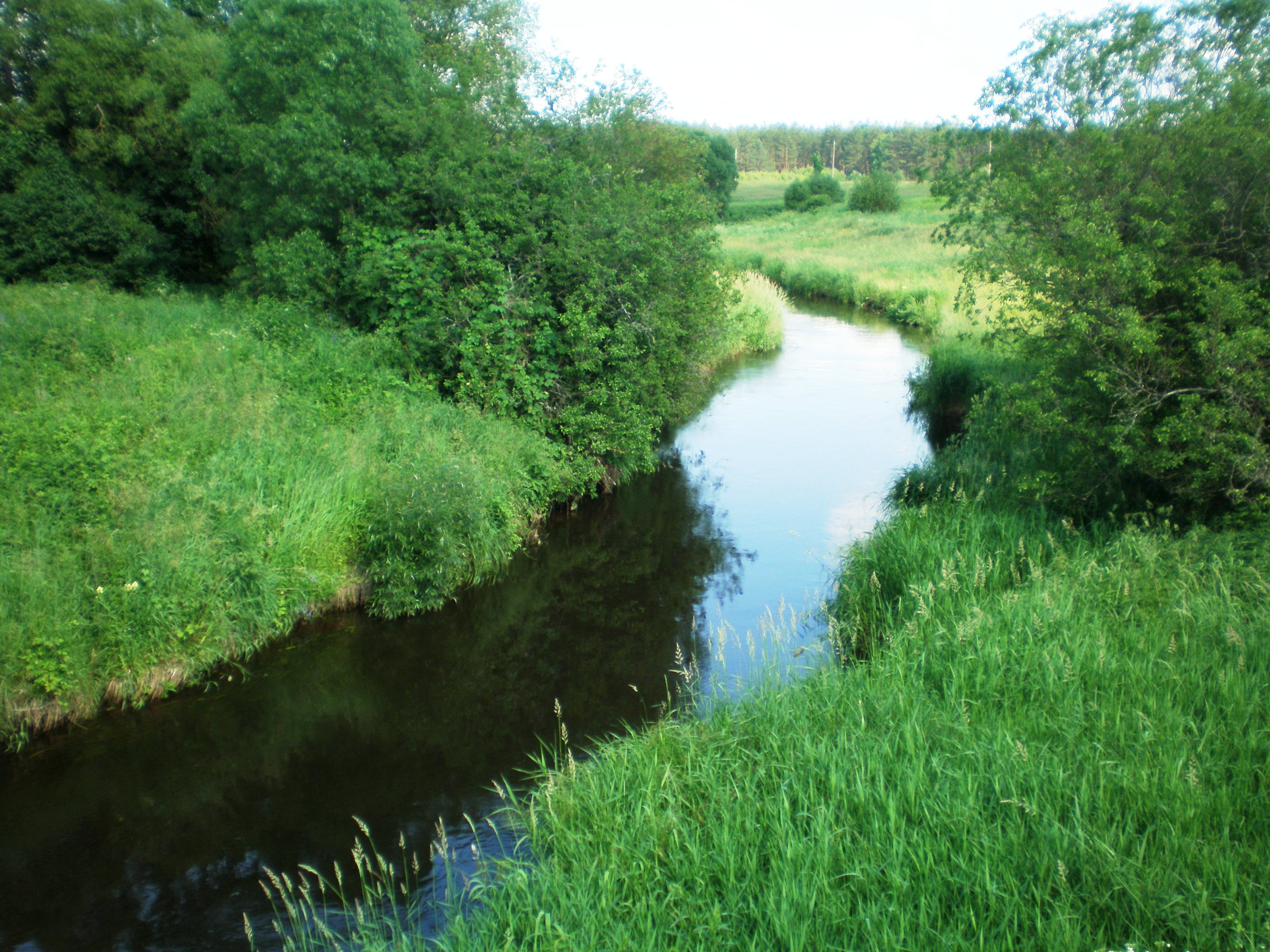 Ūla ties Šumu, Dzūkijos NP, Varėnos raj.